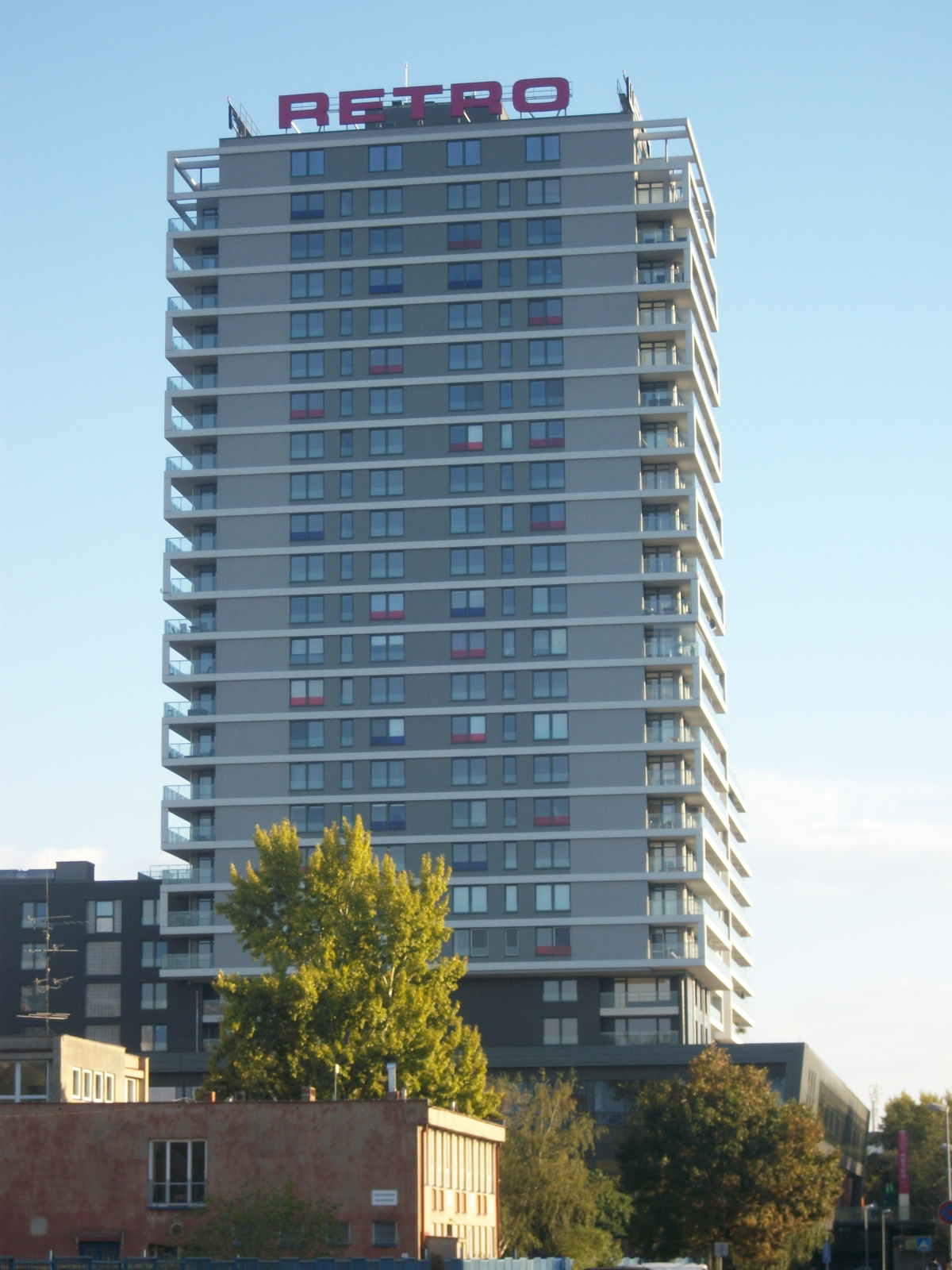 Výšková budova Retro v Bratislave